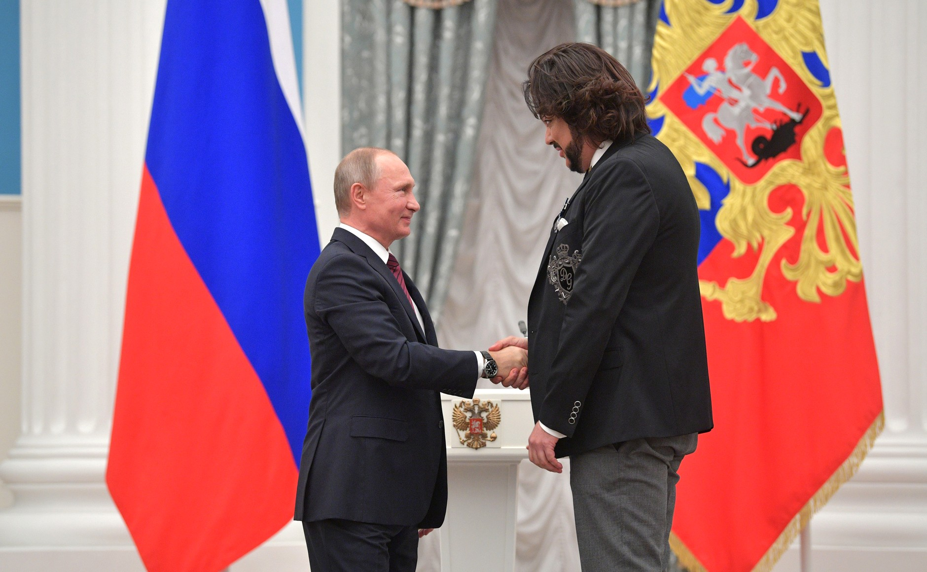 На церемонии вручения государственных наград. Орденом Почёта награждён певец Филипп Киркоров.